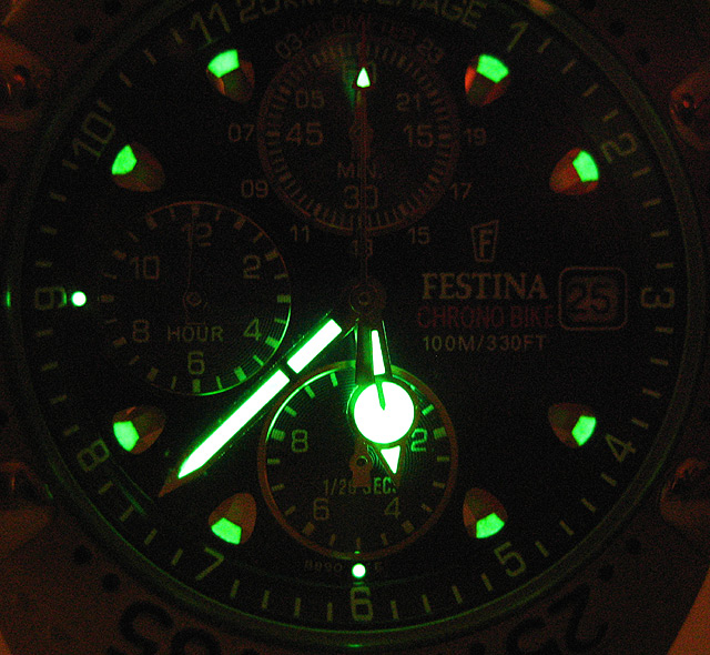 Zifferblatt beleuchtet durch Luminovapigmente